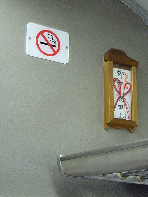 京阪電気鉄道車内に付けられている、成田山大阪別院明王院の交通安全御守 （写真は8000系）